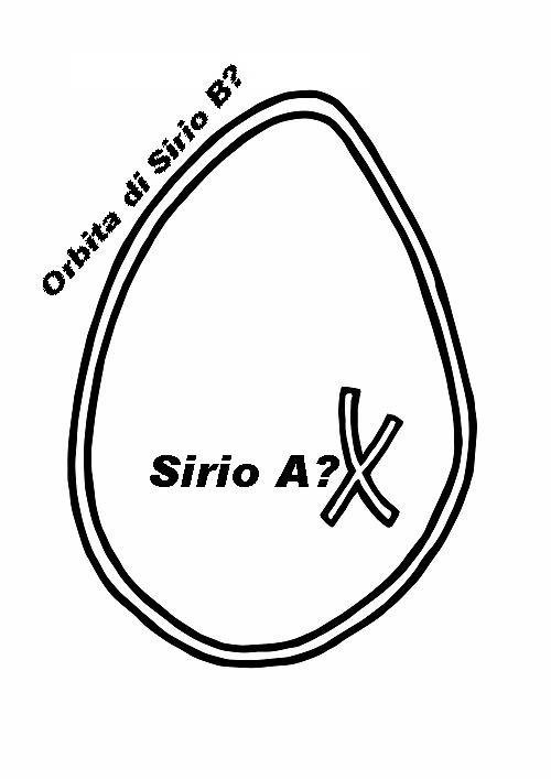 Diagramma del sistema doppio Sirius A and B. Licensing Categoria:Immagini esclusivamente in GNU FDL